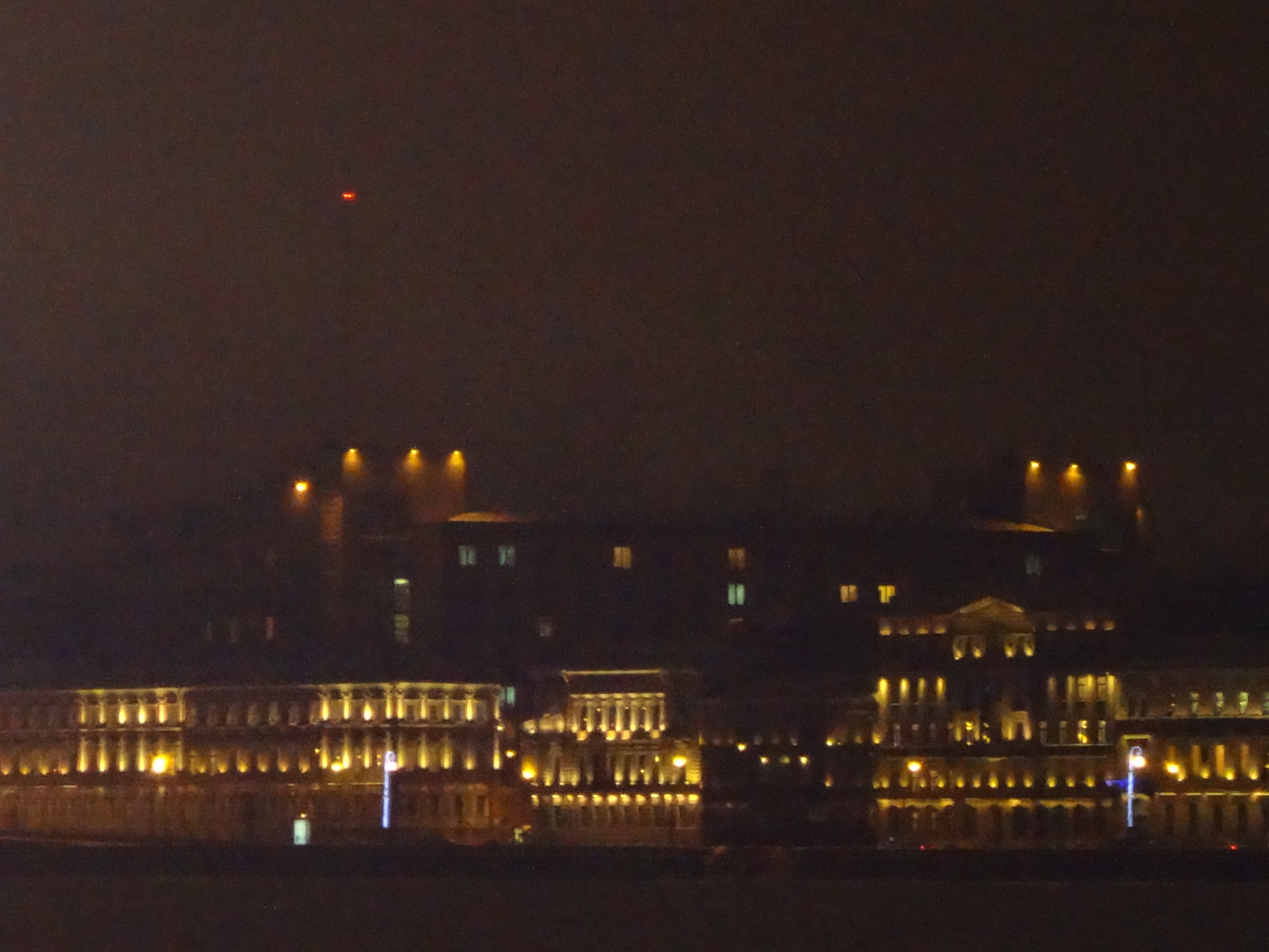 Большой дом на Литейном